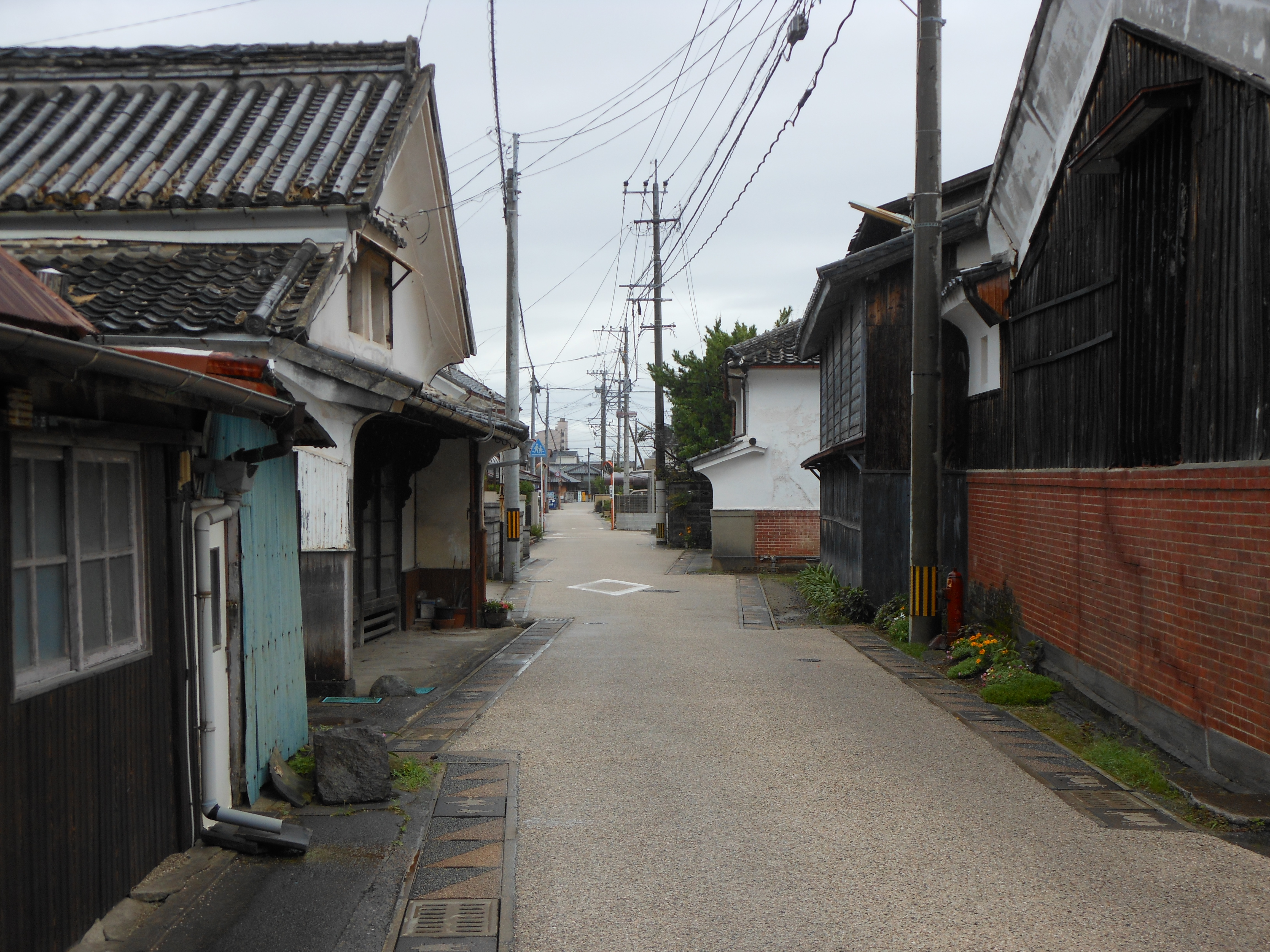 旧長崎街道、佐賀県佐賀市八戸一丁目ののこぎり型街並み。